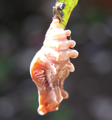 Common Rose pupa Pachliopta aristolochiae